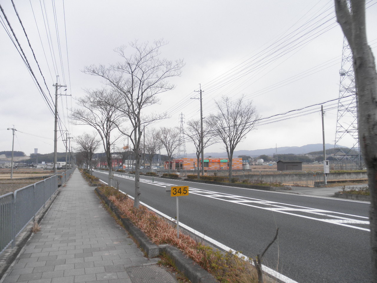 京都府木津川市木津馬ヶ瀬 国道163号